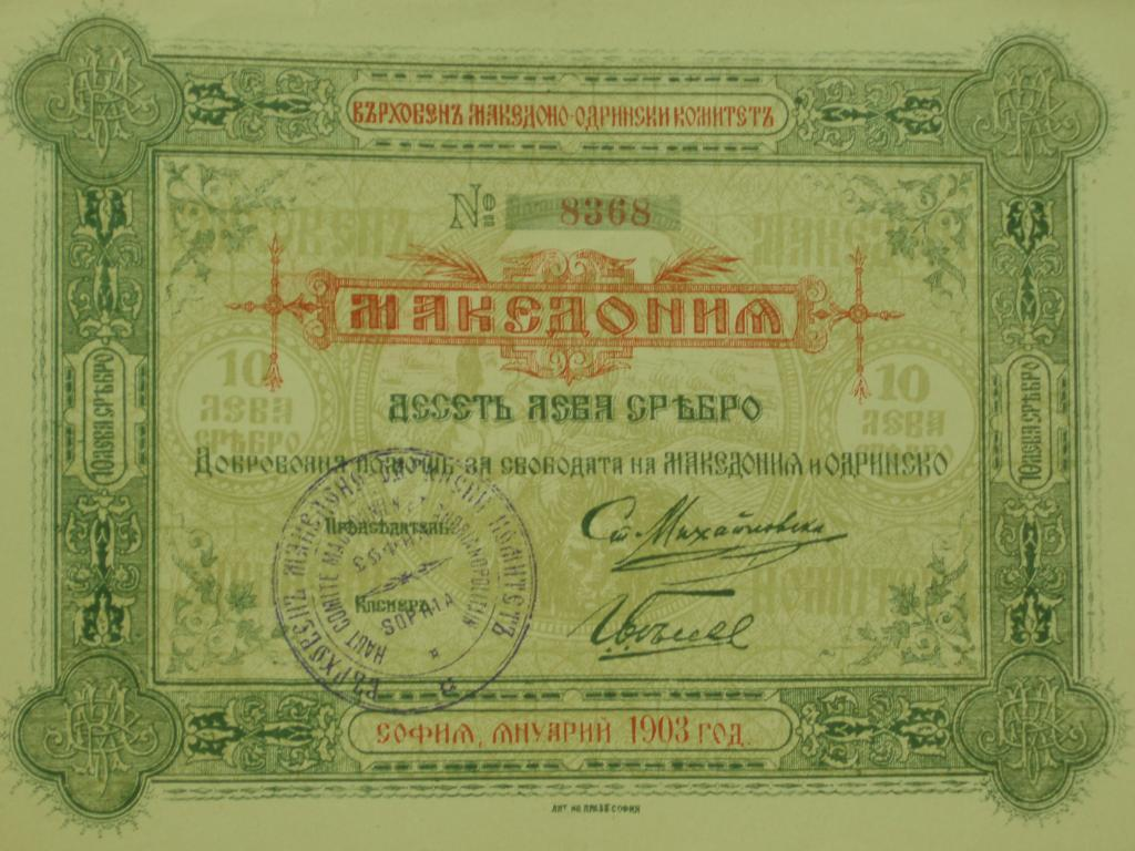 Облигация на ВМОК с подписите на Стоян Михайловски и Иван Цончев.